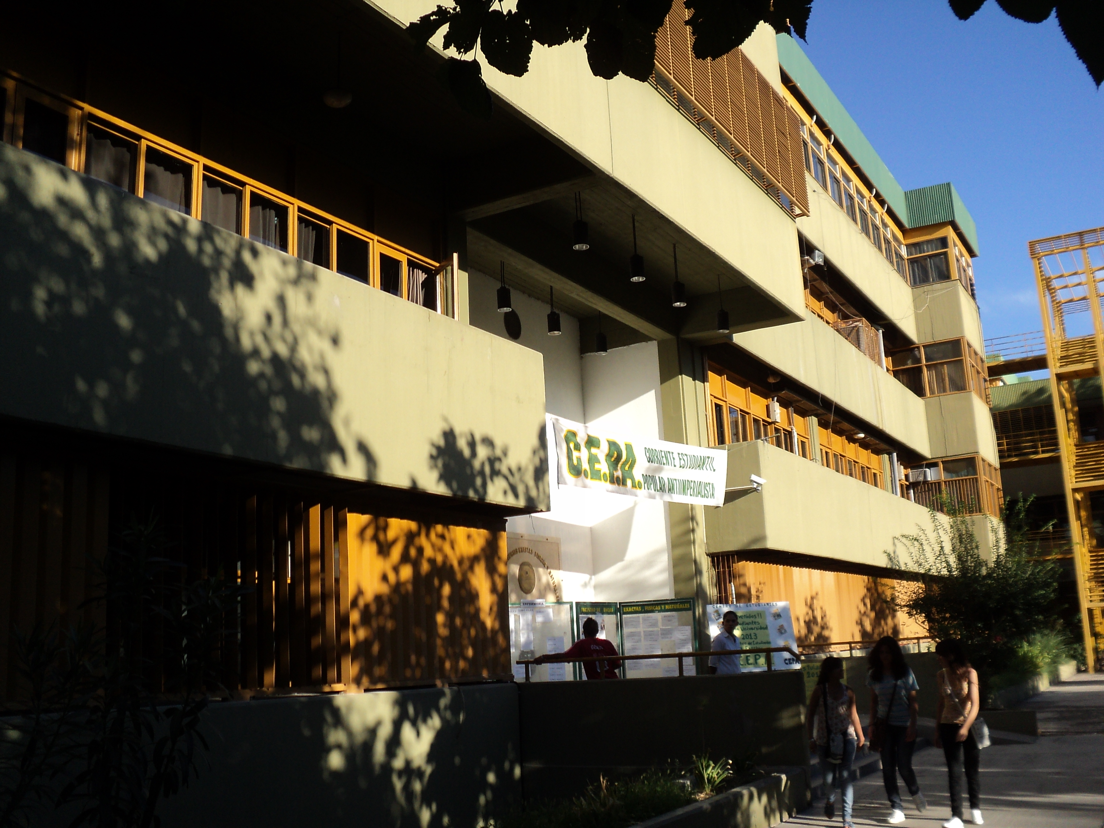 INGRESO PINCIPAL A EXACTAS